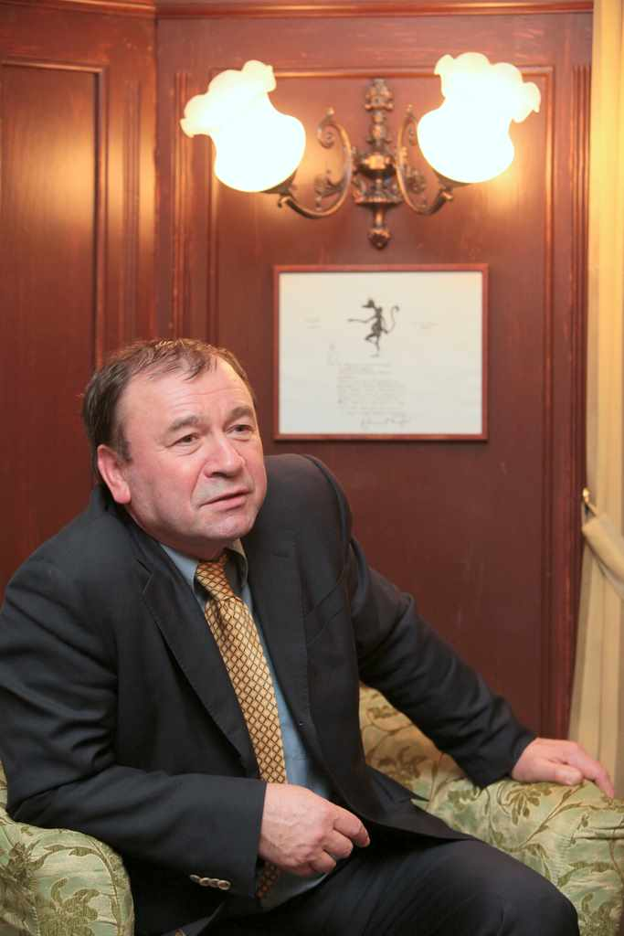 Юрий Минаевич Пирютко - петербургский историк и краевед